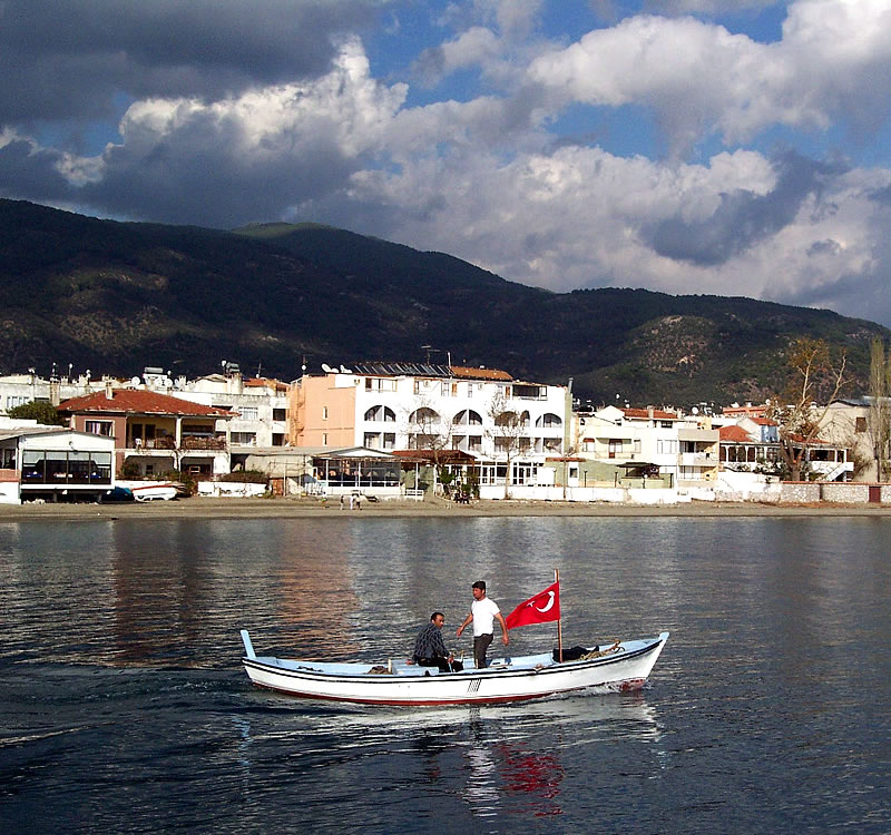 Lisans